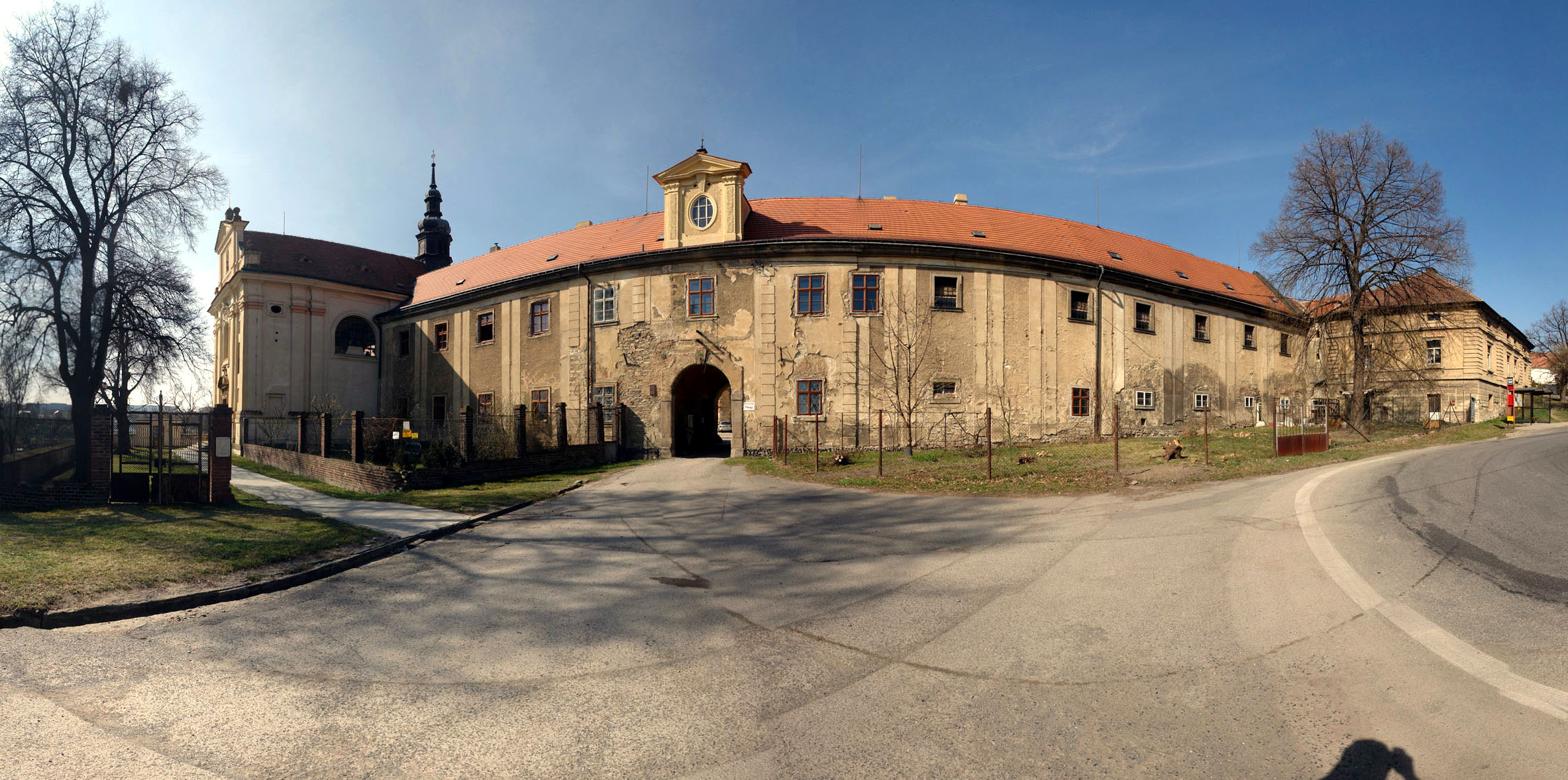 Rezidence jezuitská (Tuchoměřice), Tuchoměřice 1